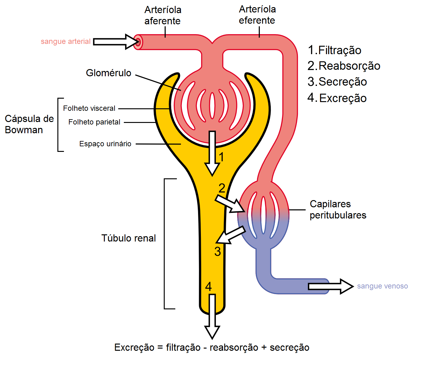 Fisiologia renal: filtração, reabsorção e secreção